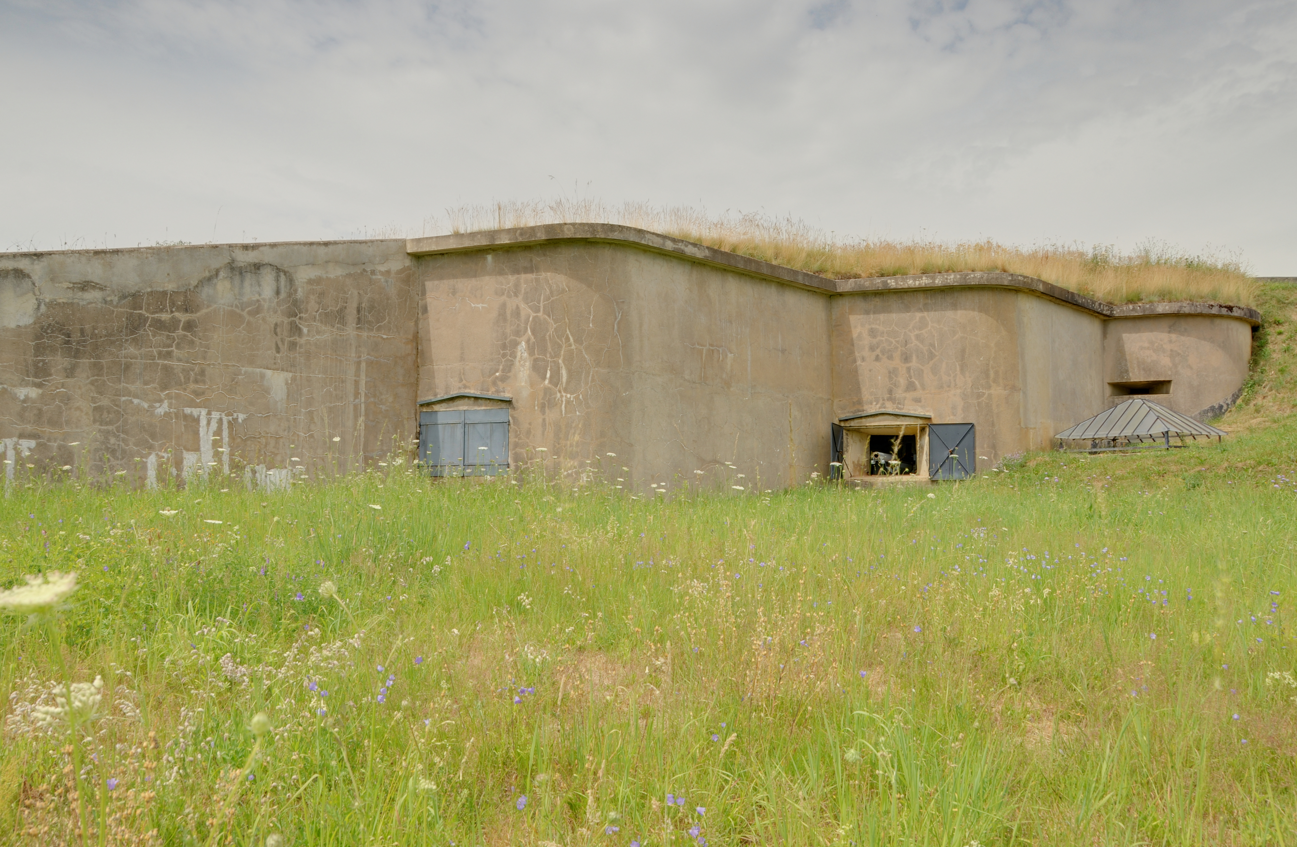 Casemate de Bourges Ouest vue de l'extérieur (HDR).